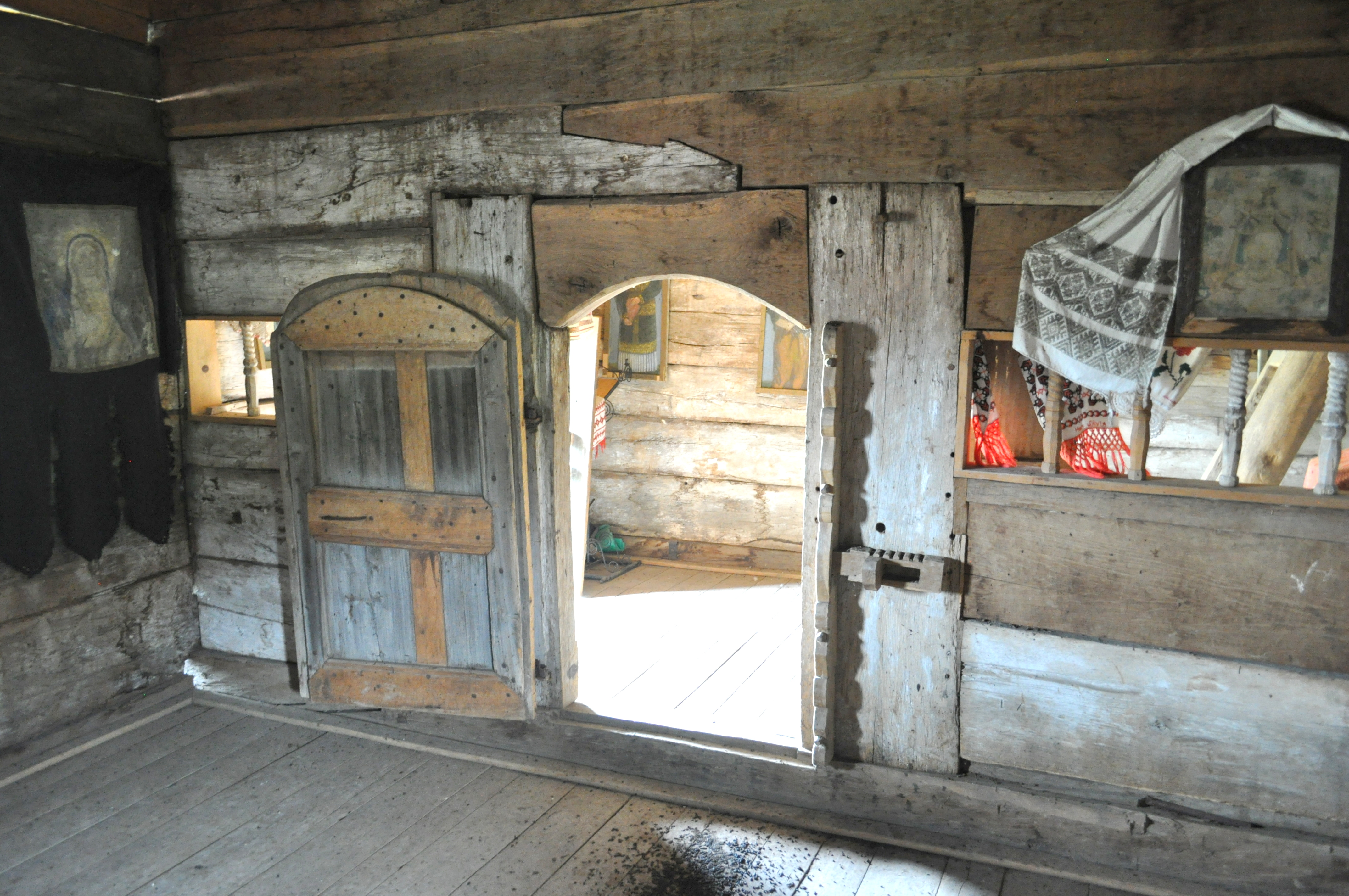 Biserica de lemn „Sfinţii Arhangheli Mihail și Gavriil" din Poarta Sălajului, comuna Românaşi, judeţul Sălaj